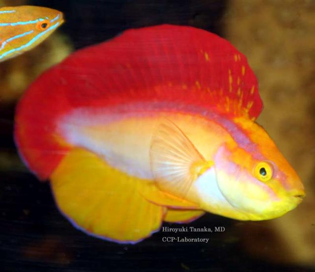 Cirrhilabrus jordani maschio